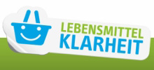 Logo Lebensmittelklarheit.de der Verbraucherzentrale Bundesverband Datum: 2011 Urheber: Verbraucherzentrale Bundesverband e.V. Quelle: Logo-Adresse: Hinweis: Aufgrund geringer Schöpfungshöhe nur marken-/namensrechtlicher Schutz. Licensing This image only consists of simple geometric shapes or text. It does not meet the threshold of originality needed for copyright protection, and is therefore in the public domain. Although it is free of copyright restrictions, this image may still be subject to other restrictions. See WP:PD#Fonts and typefaces or Template talk:PD-textlogo for more information. This work includes material that may be protected as a trademark in some jurisdictions. If you want to use it, you have to ensure that you have the legal right to do so and that you do not infringe any trademark rights. See our general disclaimer. This tag does not indicate the copyright status of the attached work. A normal copyright tag is still required. See Commons:Licensing for more information.